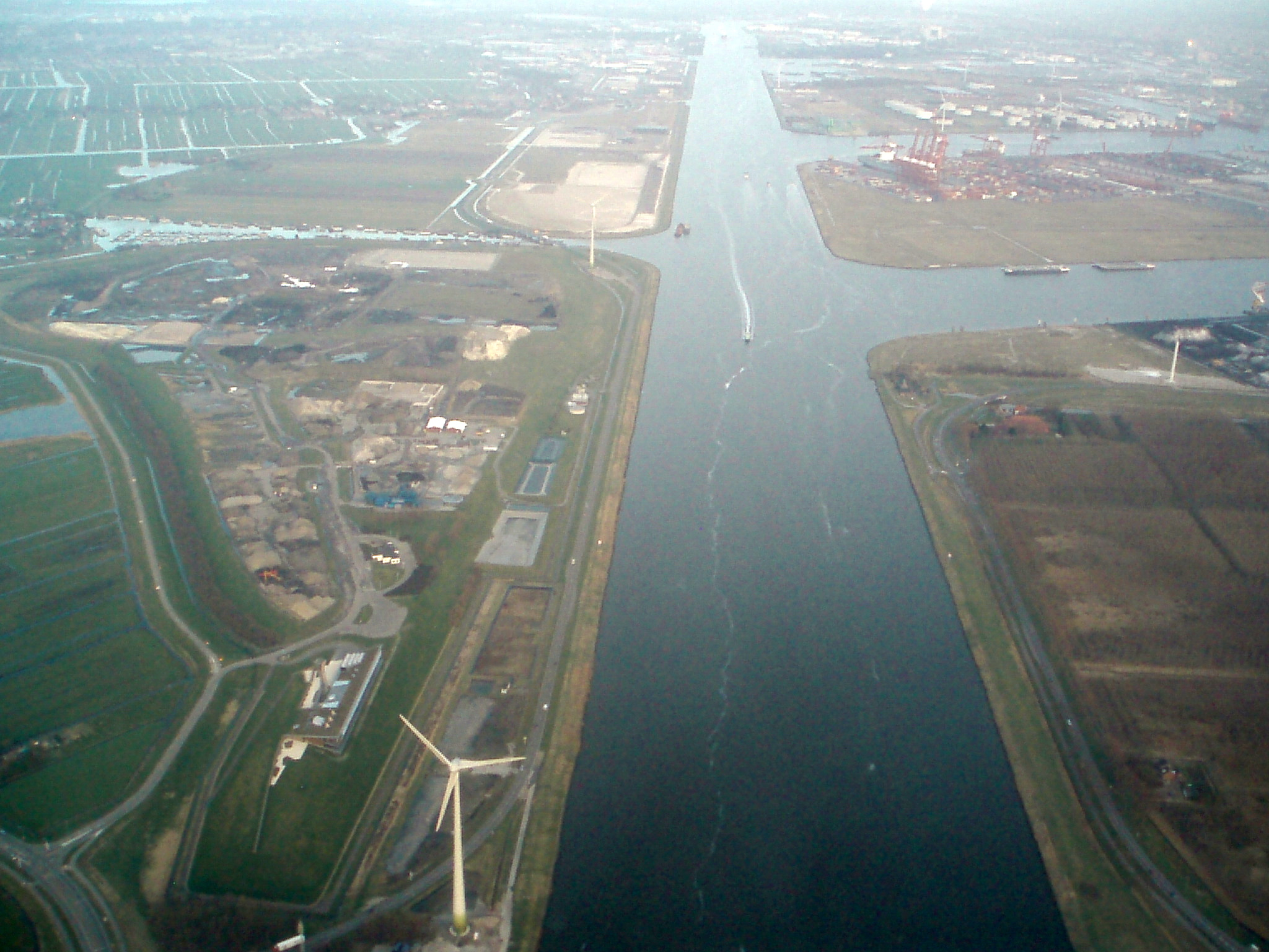 Noordzeekanaal gefotografeerd vanuit British Airways vlucht vanuit Londen Heathrow.